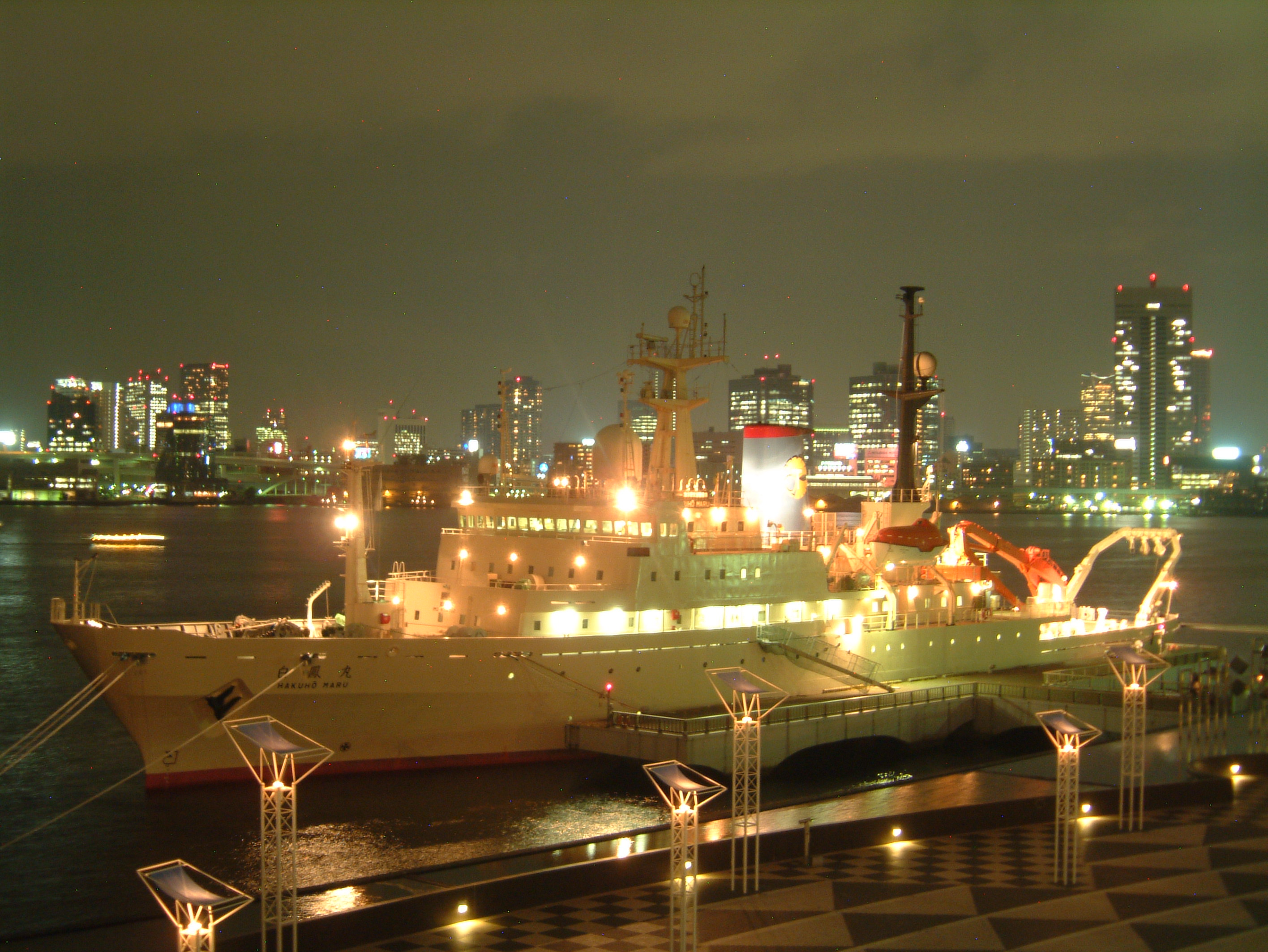 海洋研究開発機構（JAMSTEC）の調査船白鳳丸（はくほうまる）、東京都の晴海ふ頭で撮影